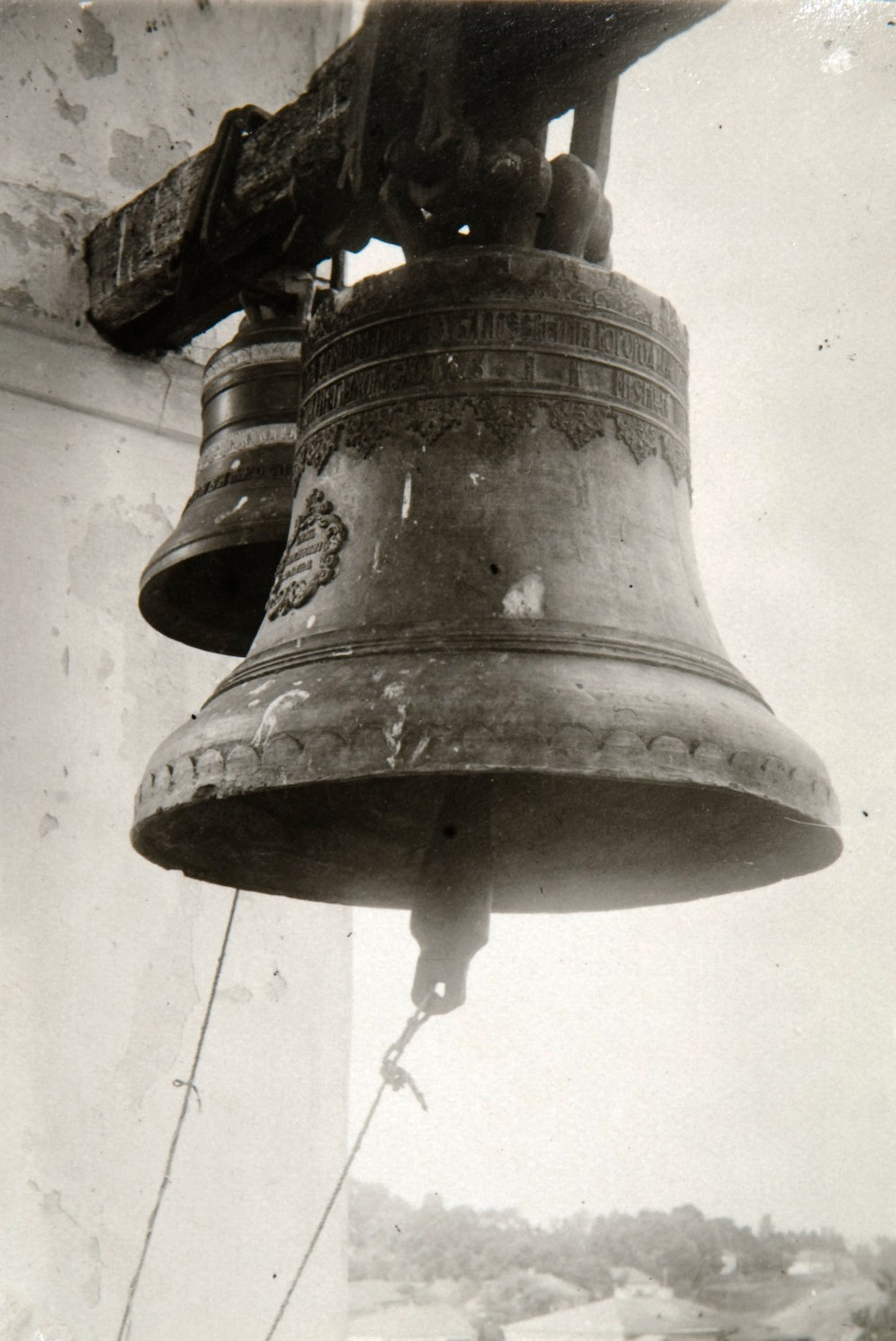 Головний колокол дзвіниця Церкви Різдва Пресвятої Богородиці на Веригині 1930 р.